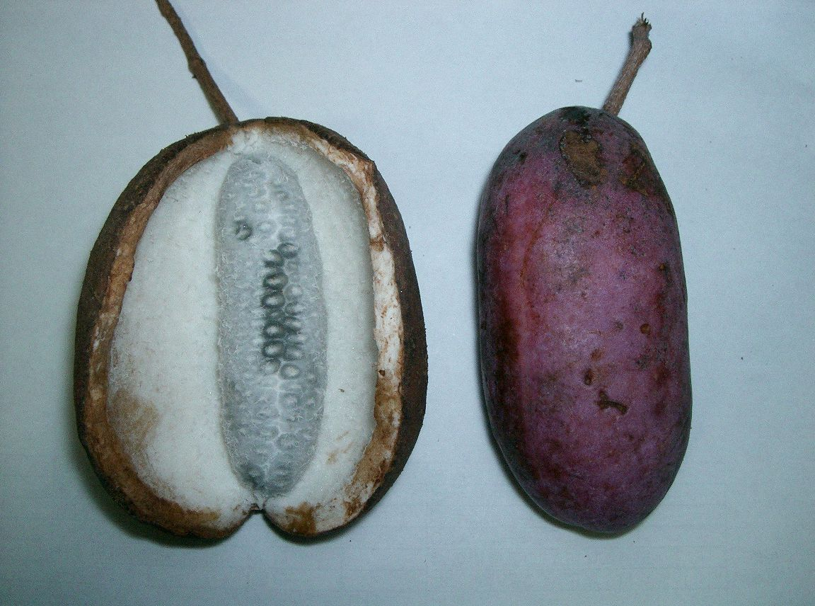 Akebia sp.